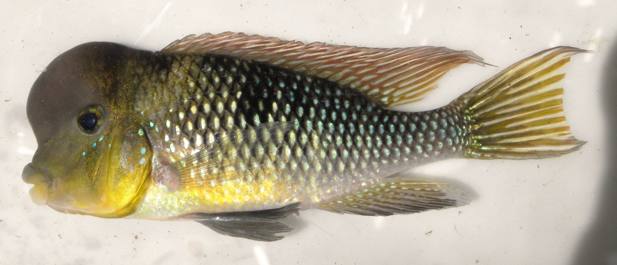 Macho adulto de Gymnogeophagus labiatus de Uruguay